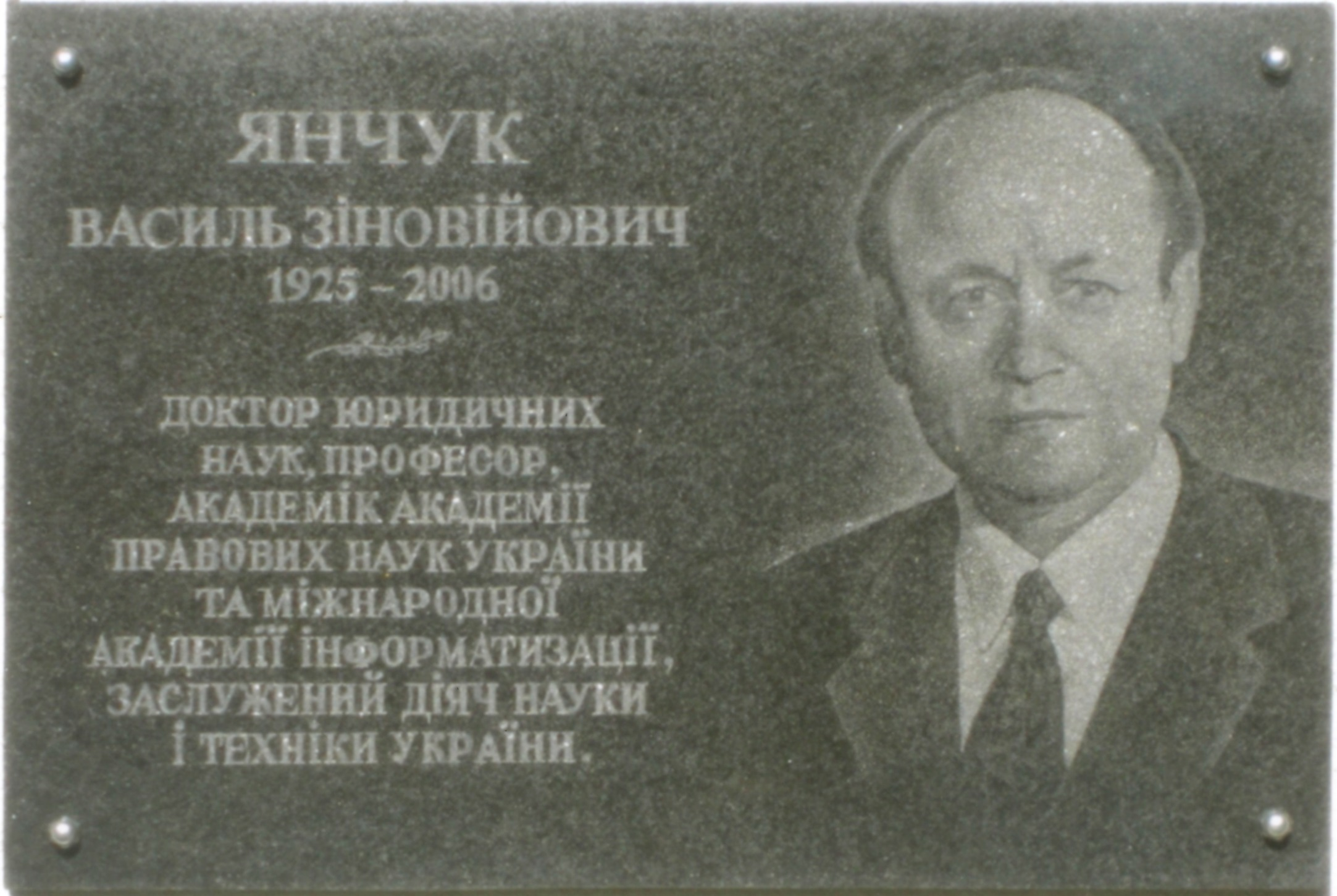 памятна доска в с. Мончин Погребищенскього району Вінницької області